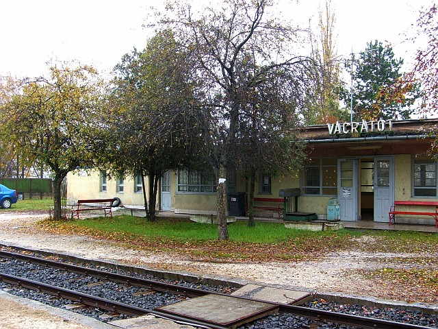 Vácrátót állomás